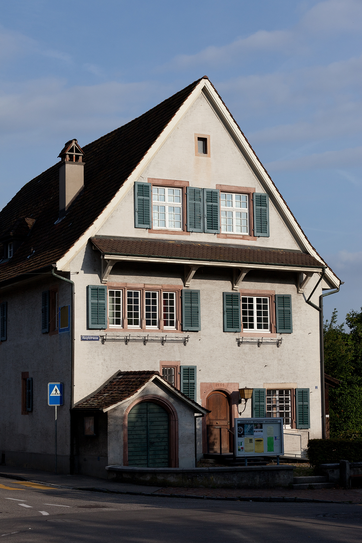 Evangelisch-Reformiertes Pfarrhaus in Muttenz (BL)